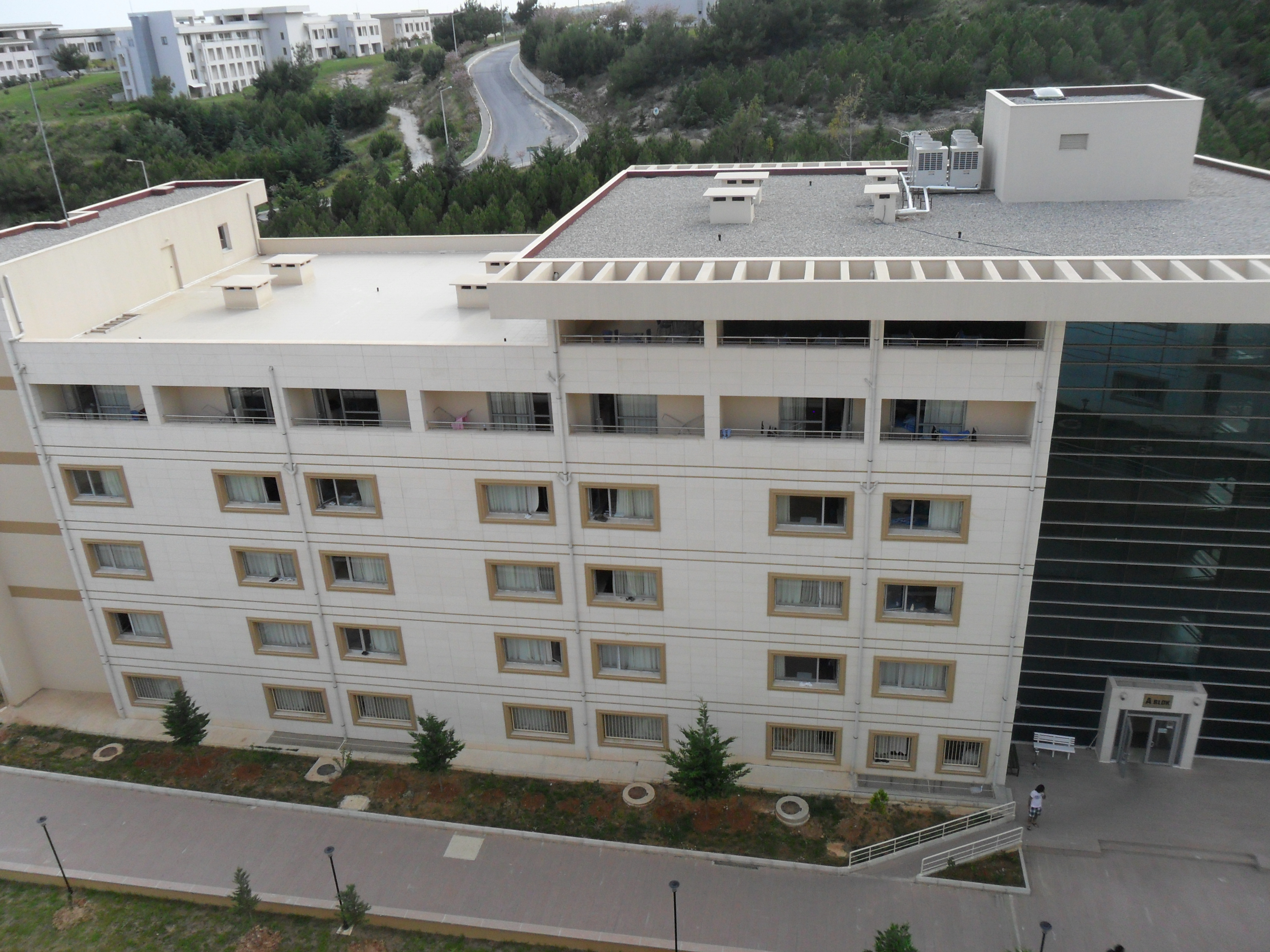 Mersin Üniversitesi Çiftlikköy Kampüsü içerisinde yer alan devlet erkek öğrenci yurdunun a bloku.